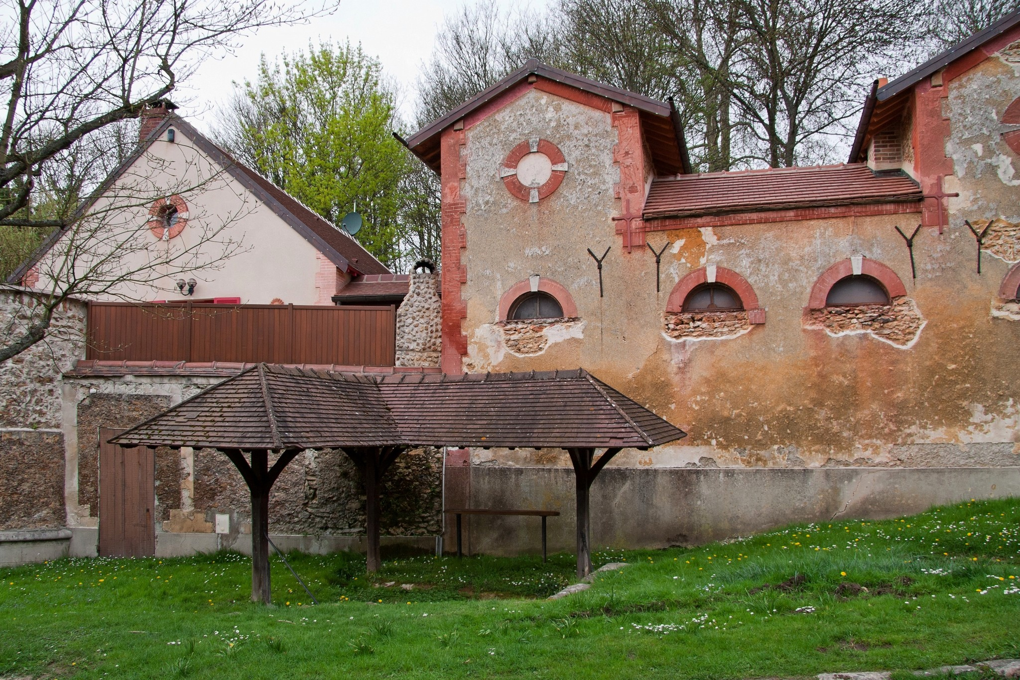 Le lavoir de Bièvres (91)